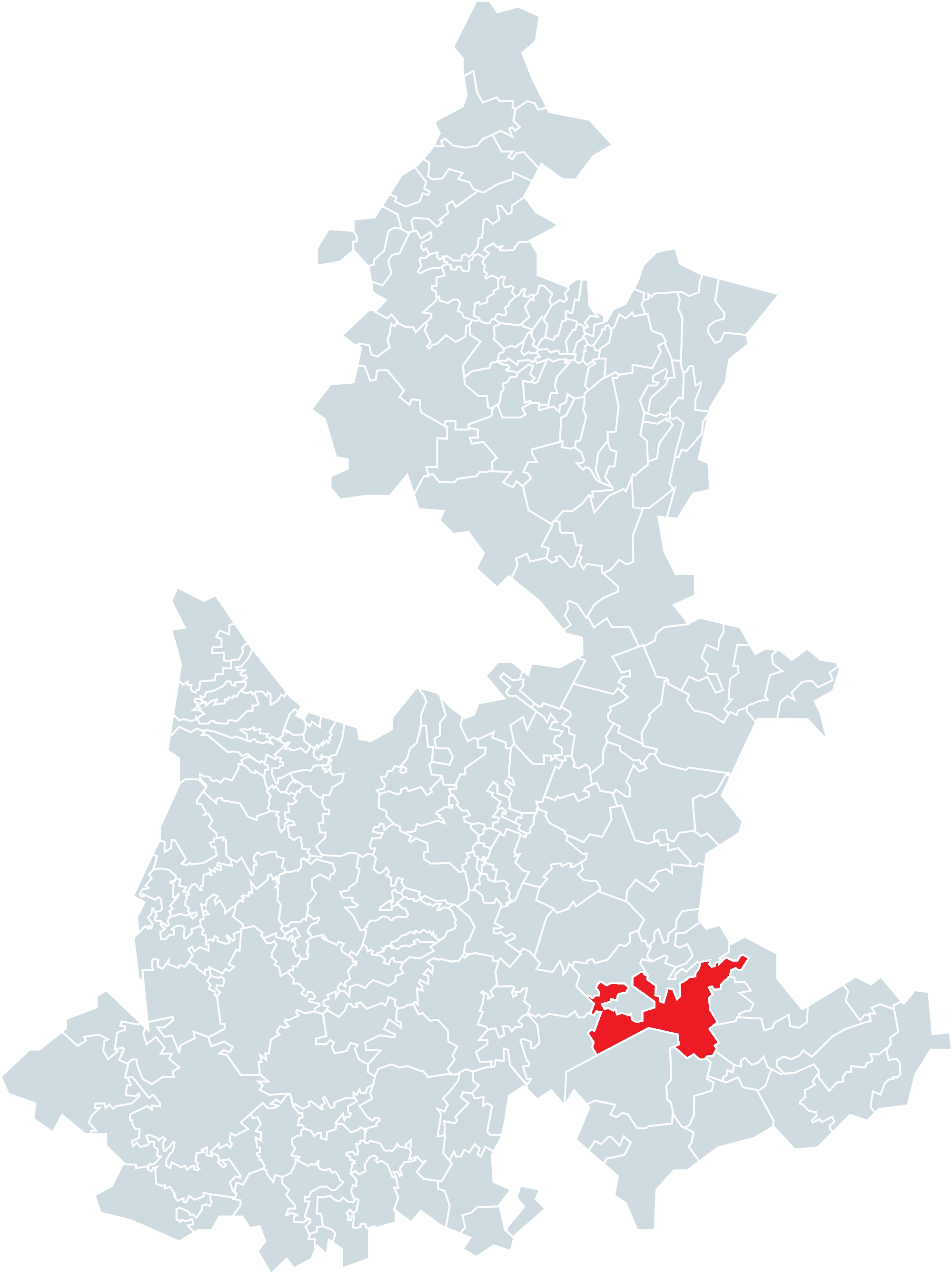 Municipio de Tehuacán